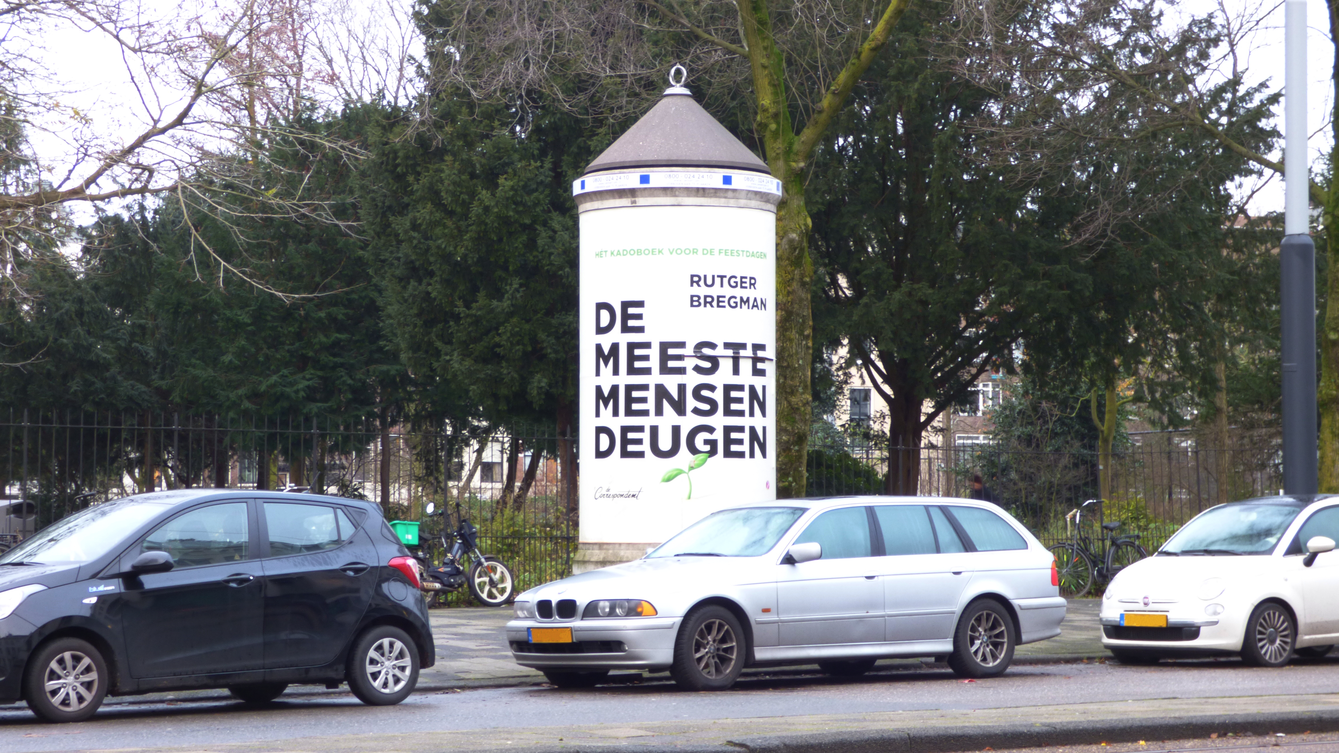 De Meese Mensen Deugen - Rutger Bregman